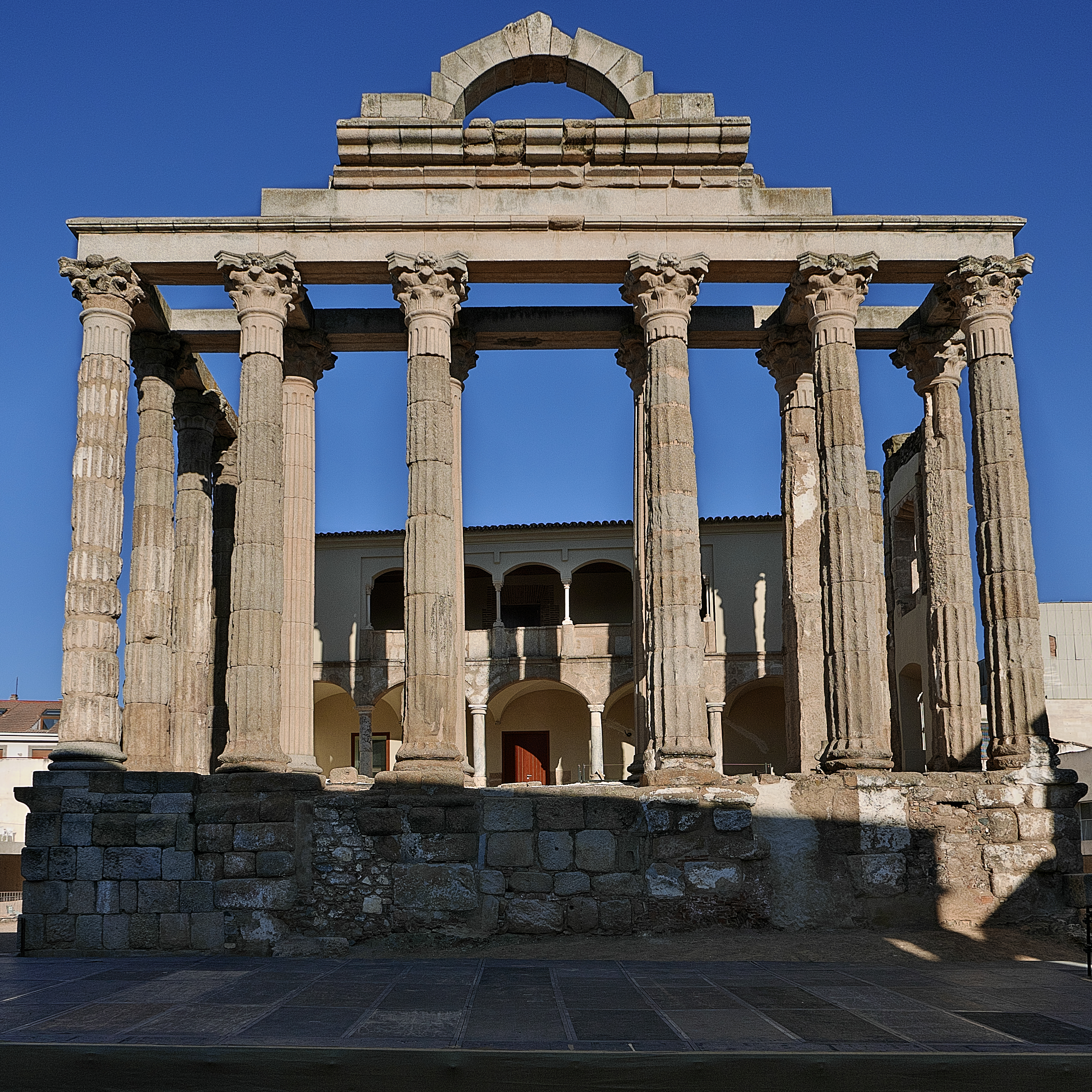 Frachada del Templo de Diana (s. I a.C.)